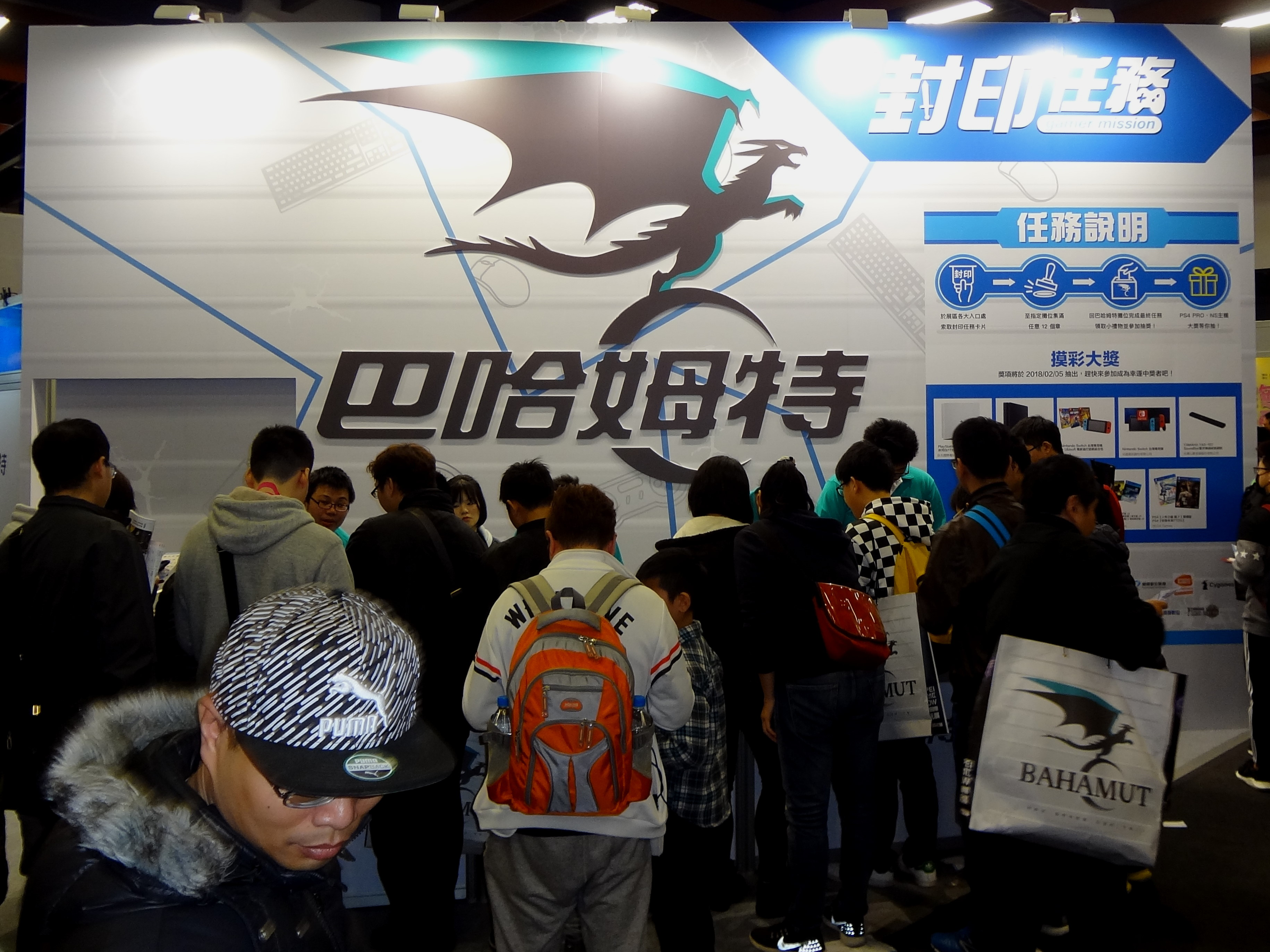 2018台北國際電玩展，巴哈姆特電玩資訊站攤位。